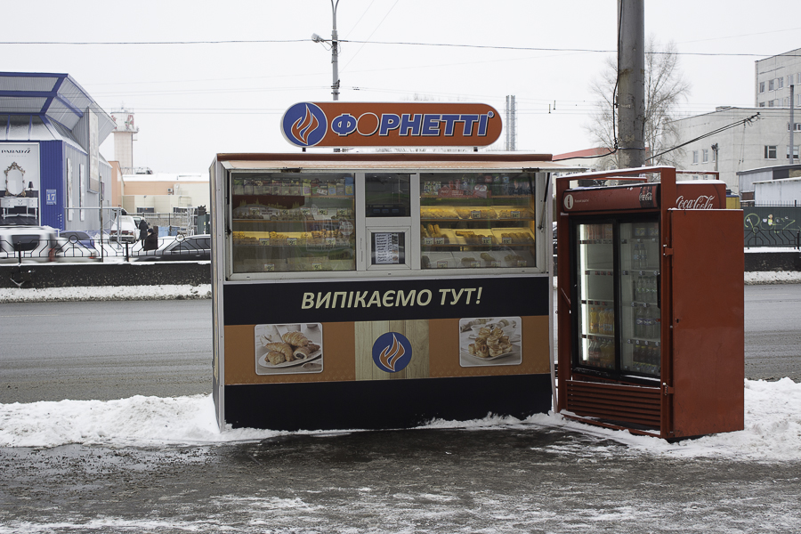 Типовий фірмовий кіоск (точка продажів) «ФОРНЕТТІ»